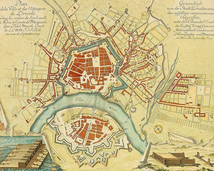 Grundriß von der Stadt Dresden und den aufselbige vorgenommenen Angriffen, unter dem Commando Sr. Excell. des Kaiserl. Königl. General-Feldmarschall-Lieutenants Herrn Grafen von Maquire im Monath September 1759, kolorierter Kupferstich von M. Keyl, Platte 37,5 x 46,5 cm